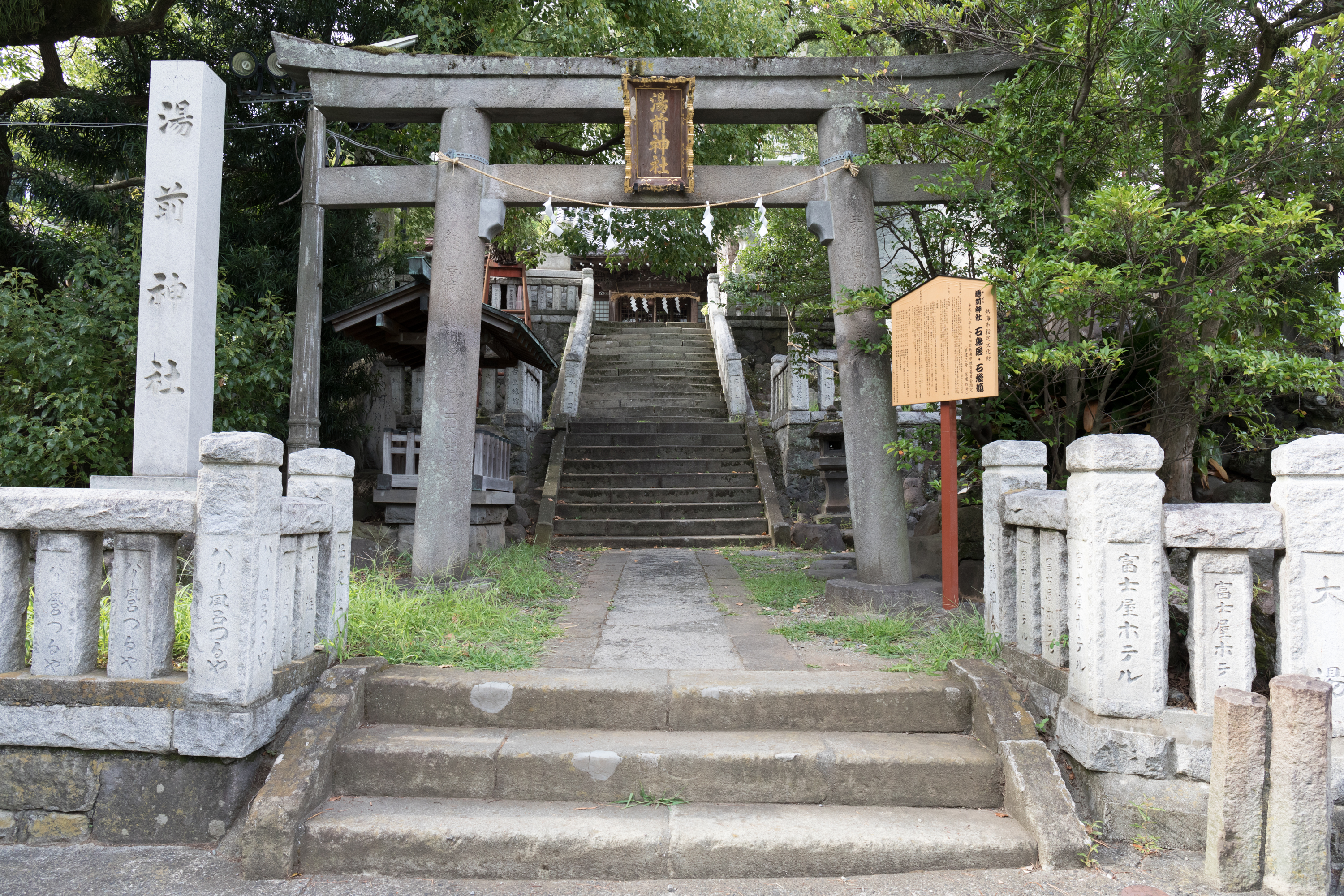 熱海市の湯前神社にある石鳥居です。熱海市指定文化財です。